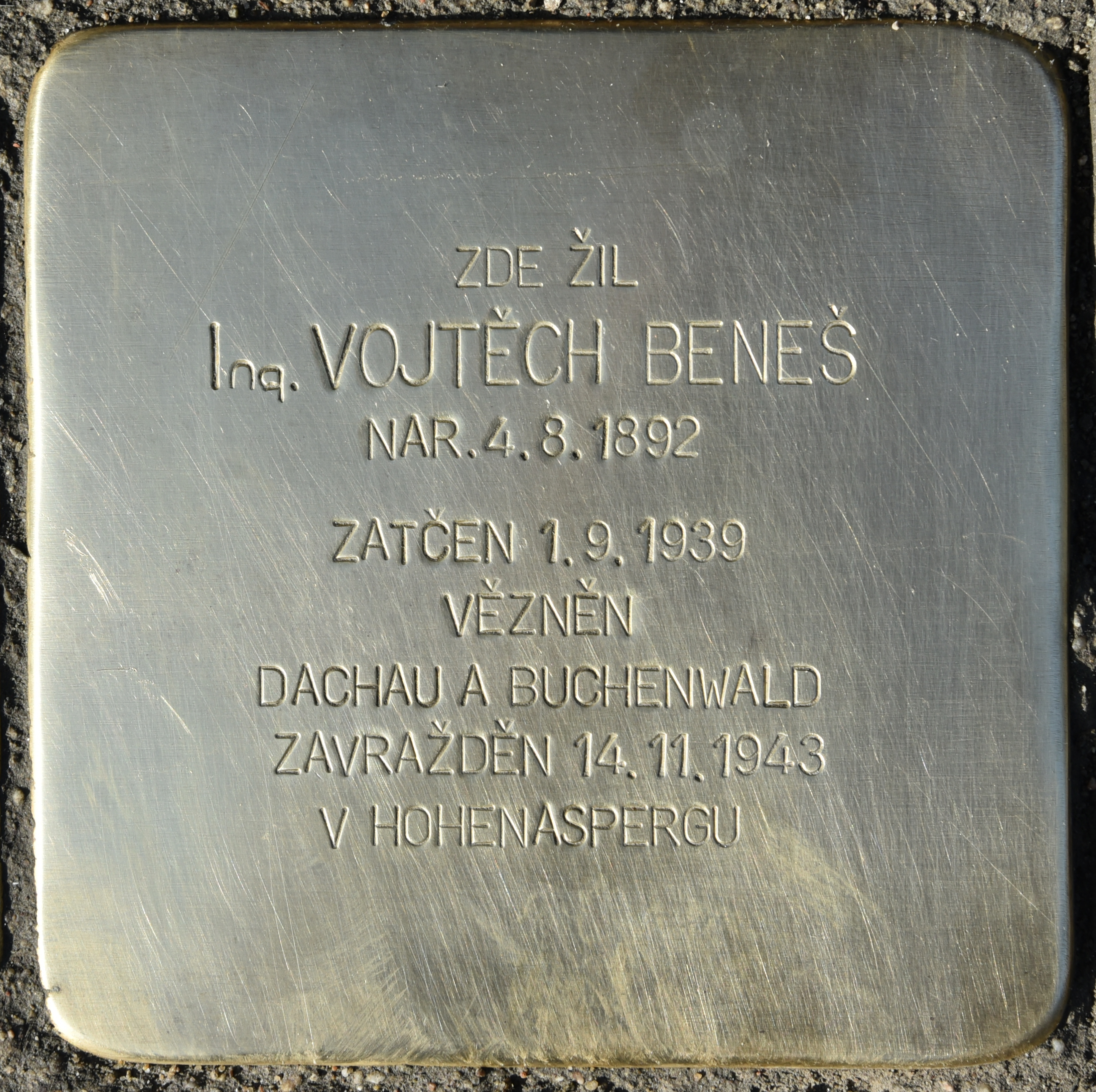 Gedenkstein für Vojtech Benes